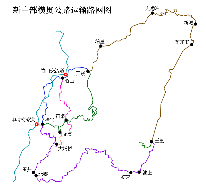 新中部横贯公路运输路网图。